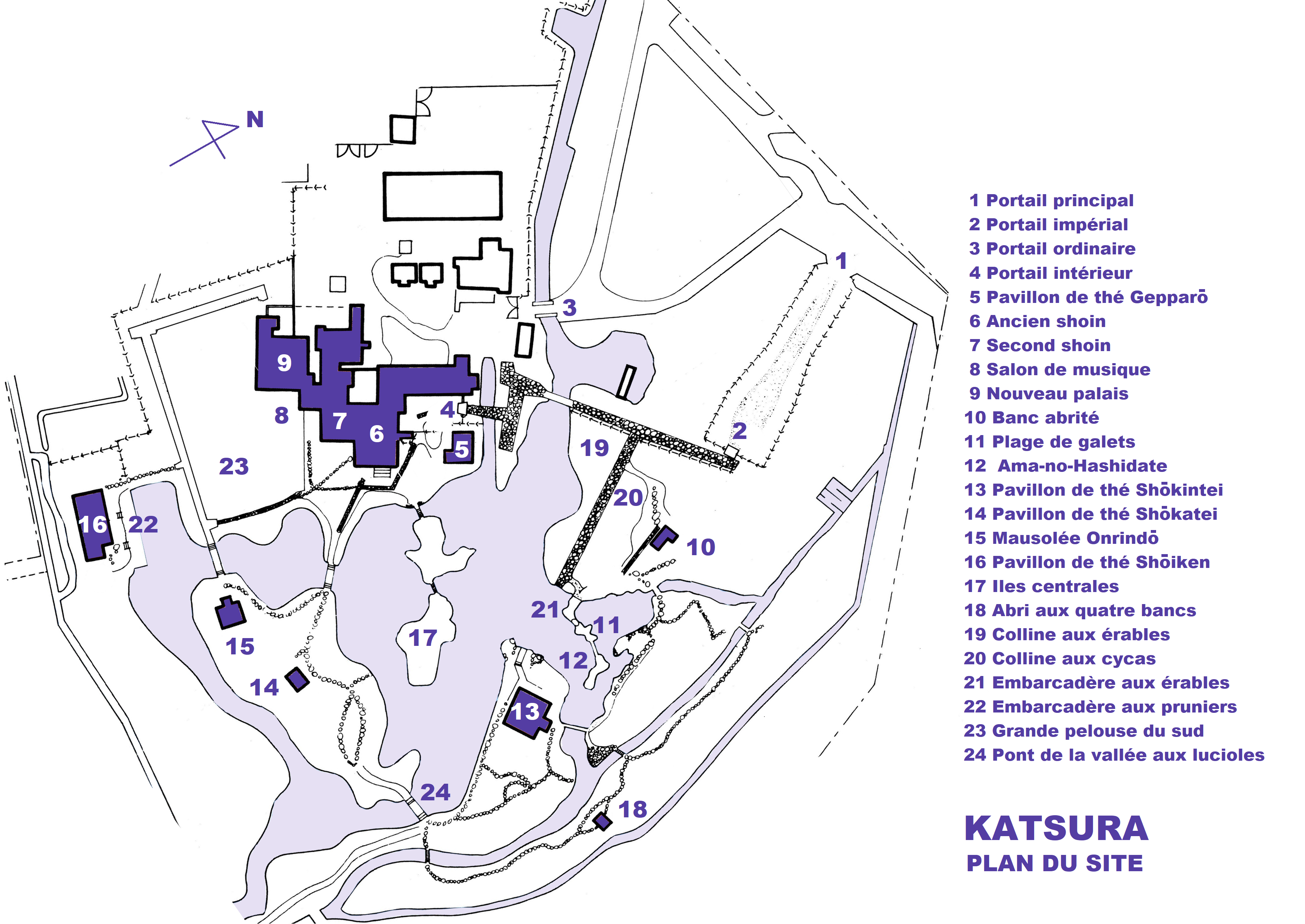 Katsura, villa impériale, Japon, Plan du site (image commons modifiée)